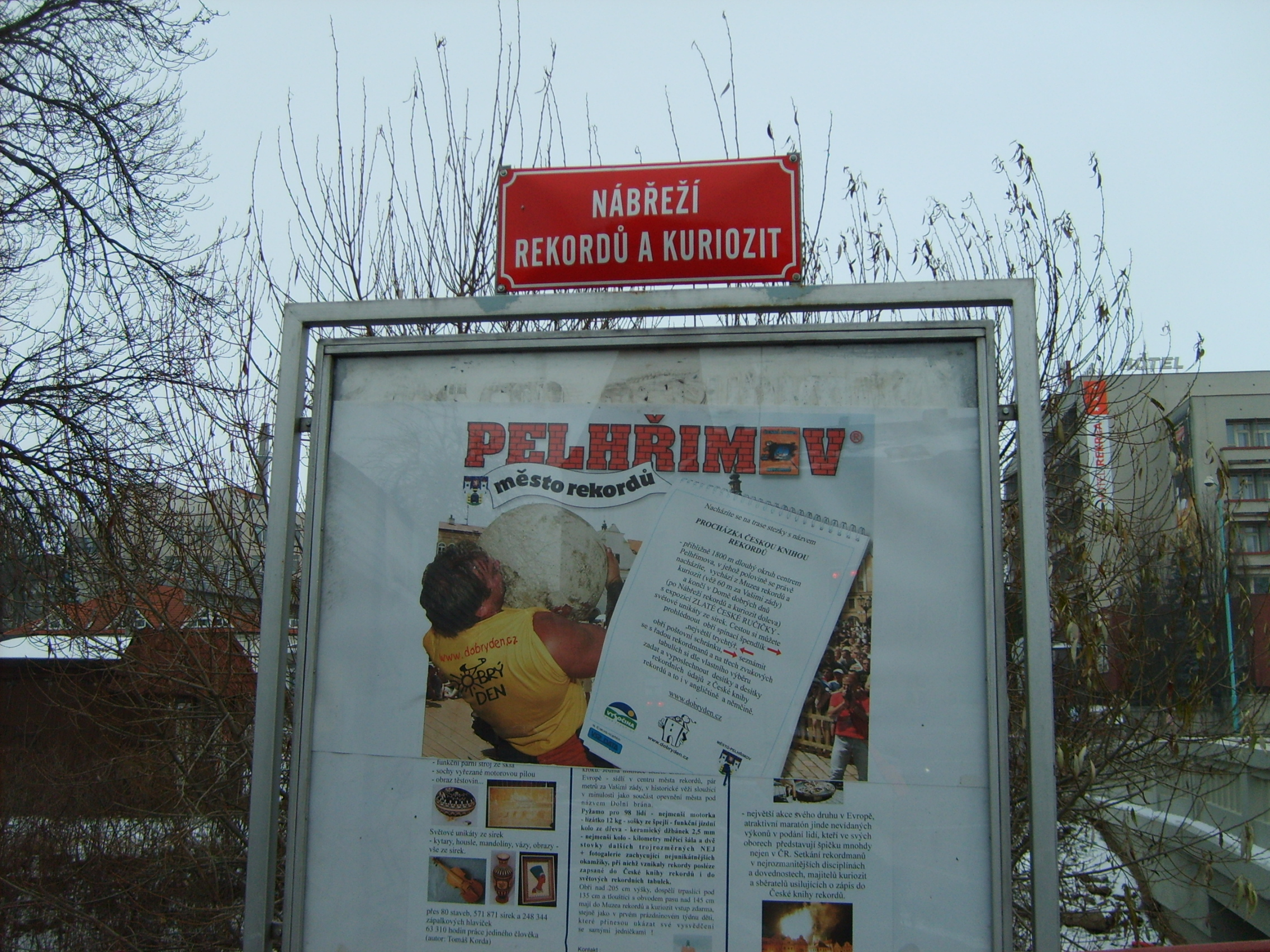 Nábřeží rekordů a kuriozit v Pelhřimově.